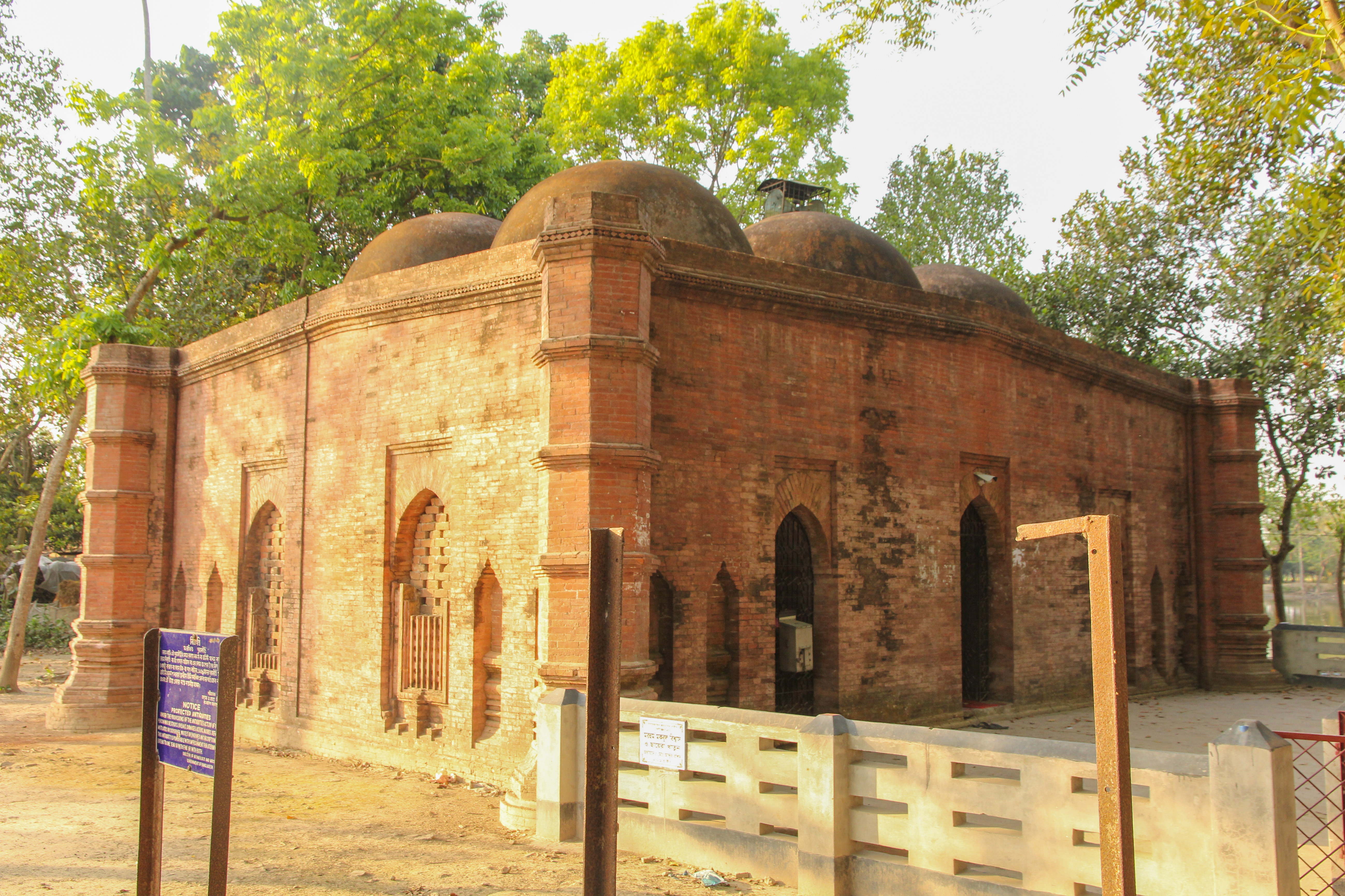 গলাকাটা দিঘি ঢিবি মসজিদ